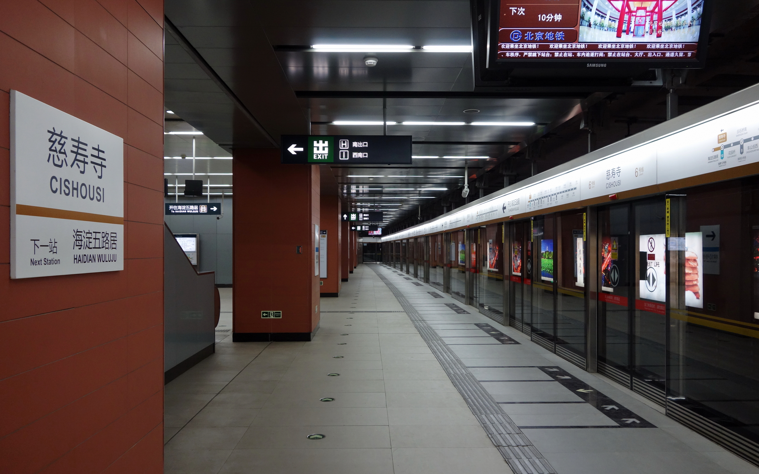 慈寿寺6号线站台，往海淀五路居站方向一侧带弯度的站台。